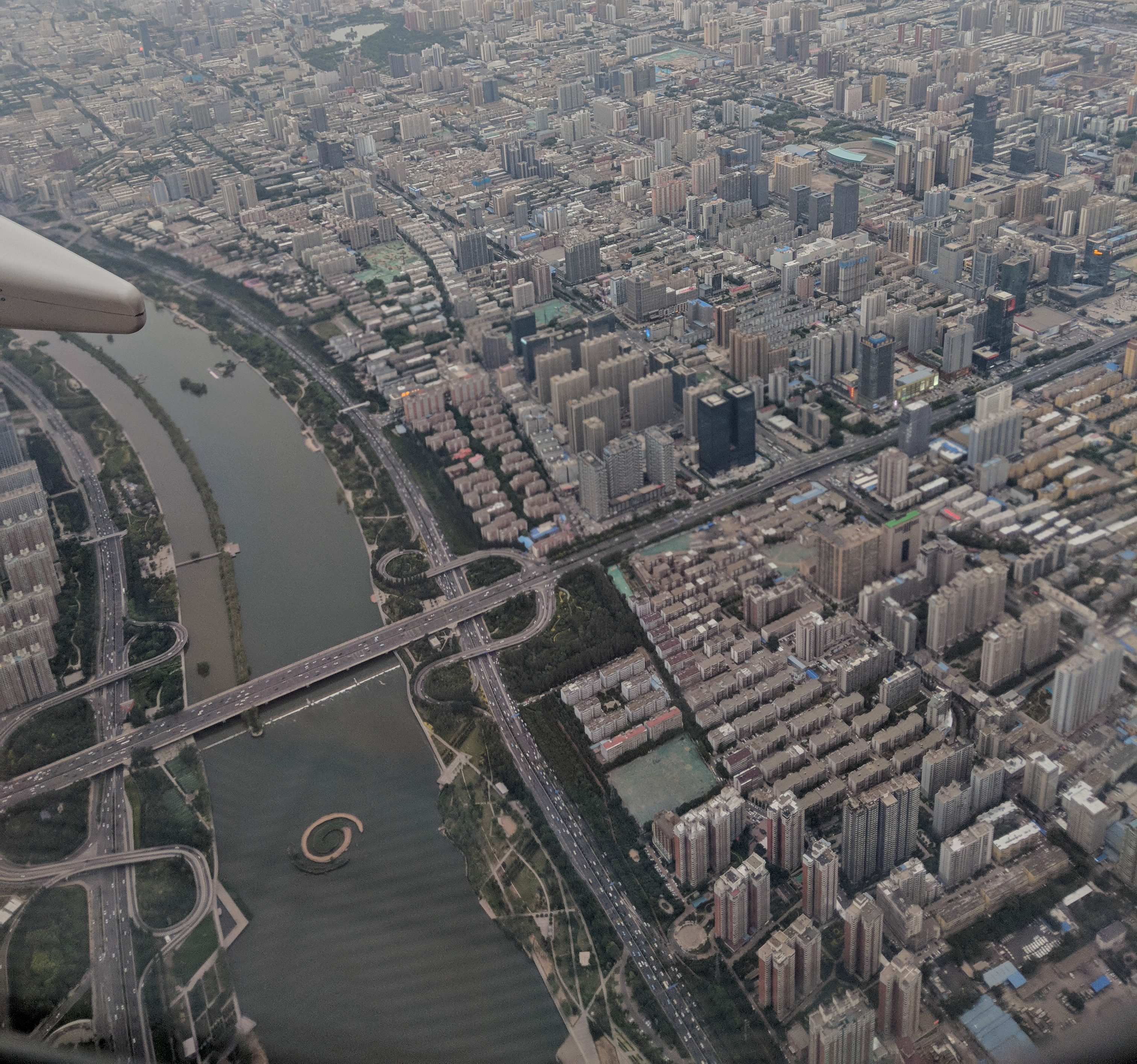 中文（中国大陆）: 太原市市区